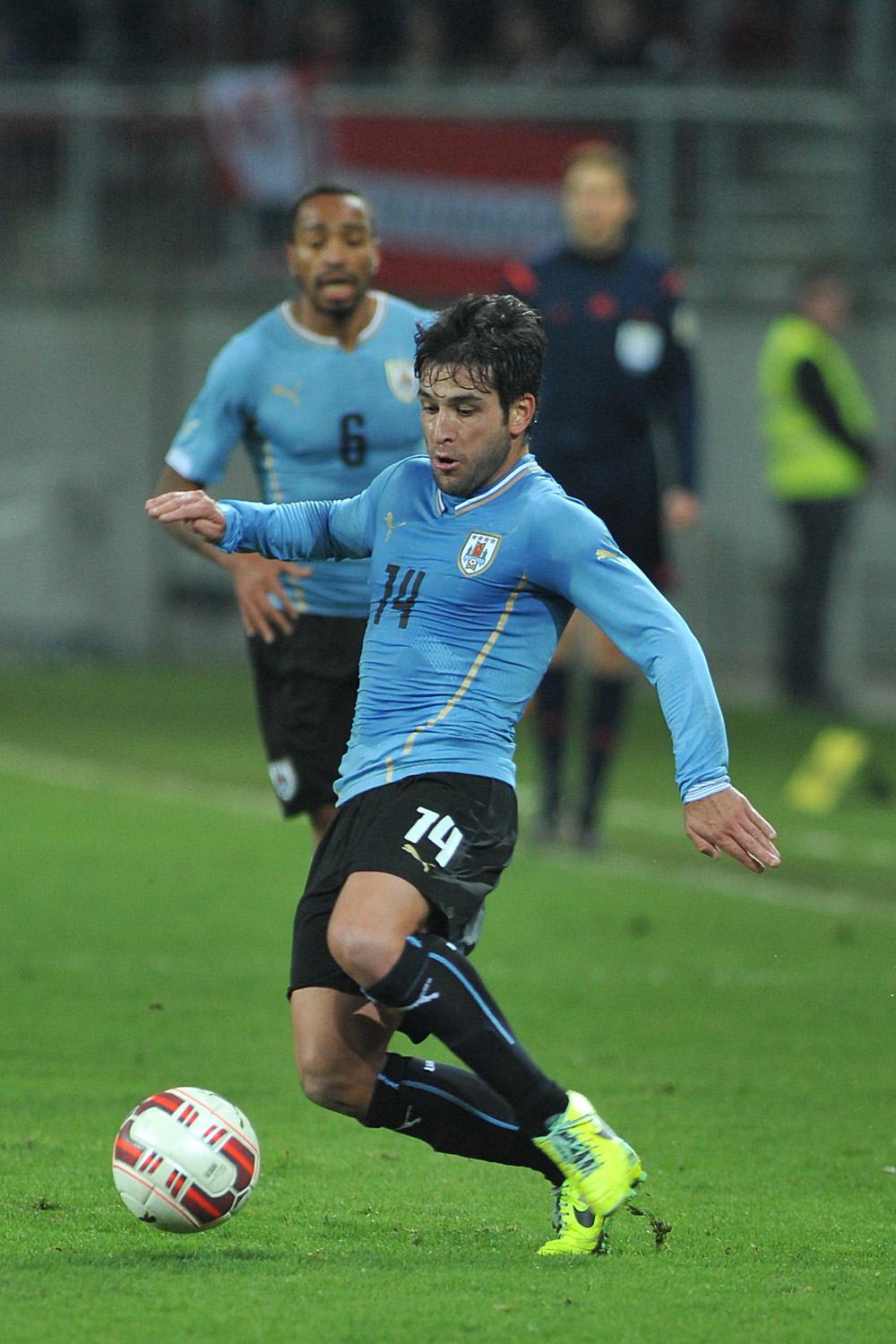 Freundschaftliches Länderspiel Österreich - Uruguay am 5. März 2014 in Klagenfurt: Nicolás Lodeiro